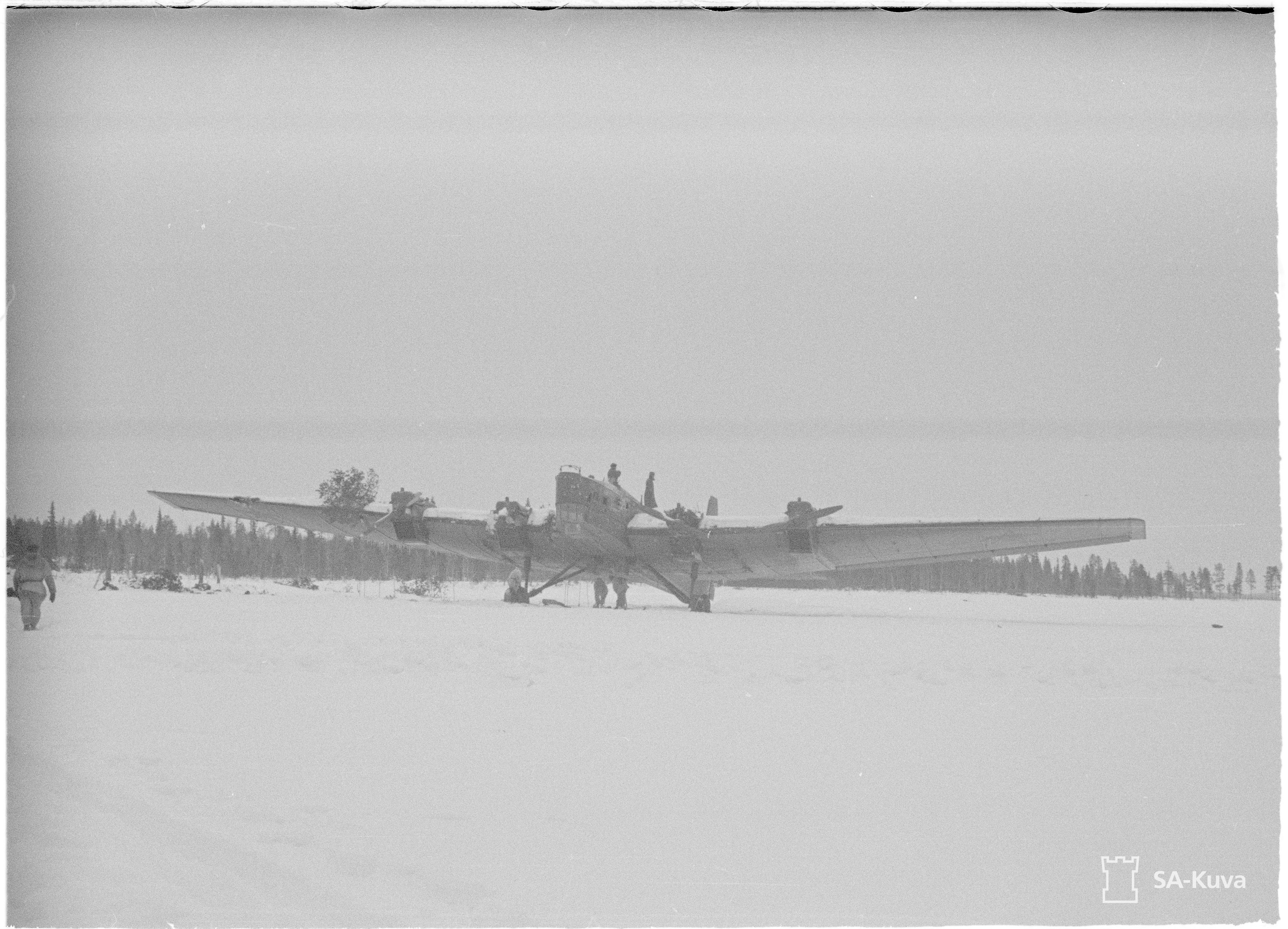 Kuhmo-Saunajärvi. Venäl. pakkolaskun tehnyt ja kranaatinheittillä tuhottu lentokone. (Kuvassa on Tupolev TB-3 pommikone, joka osunut laskeutuessaan puihin.) Kuvauspaikka: Kuhmo